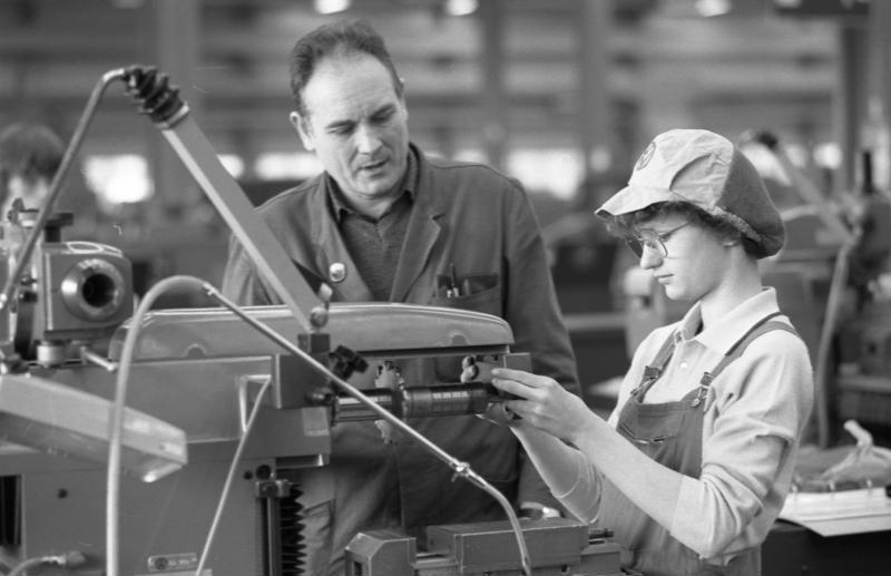 VW-Werk Wolfsburg- in der Lehrwerkstatt 16.-17.03.1981